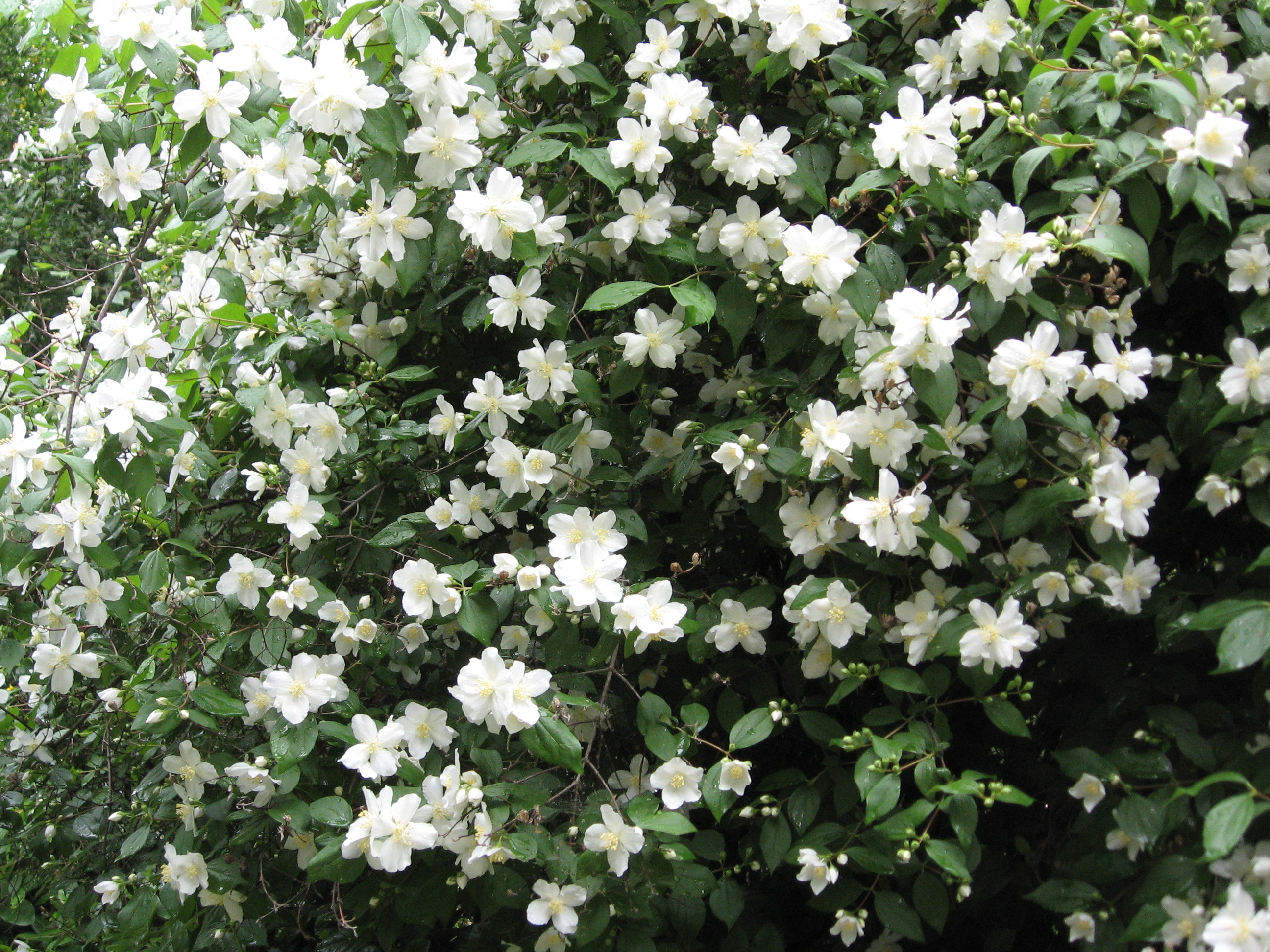 Philadelphus lewisii. Real Jardín Botánico de Madrid.